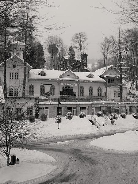 Muzum w willi na pl. Dietla